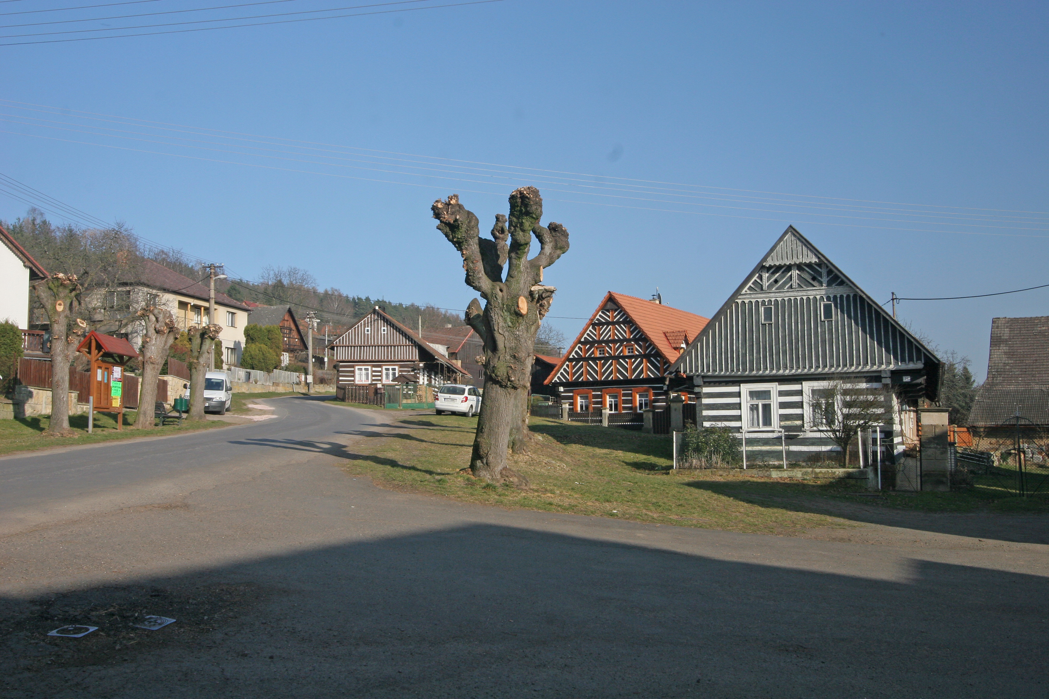 Vojice čp. 71